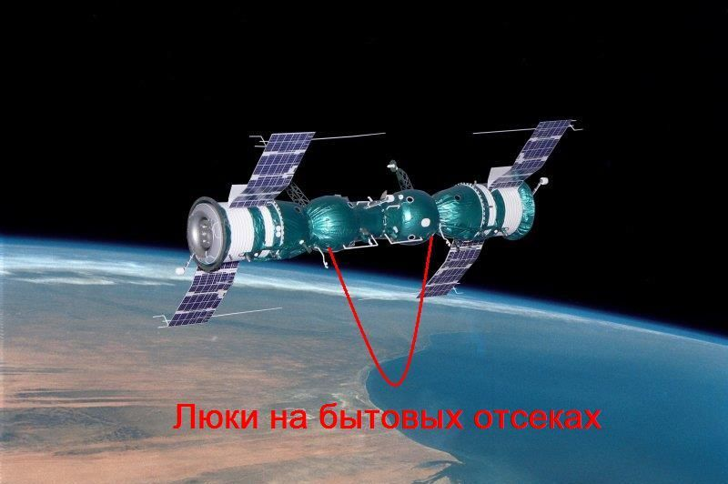 Союз-4 и Союз-5